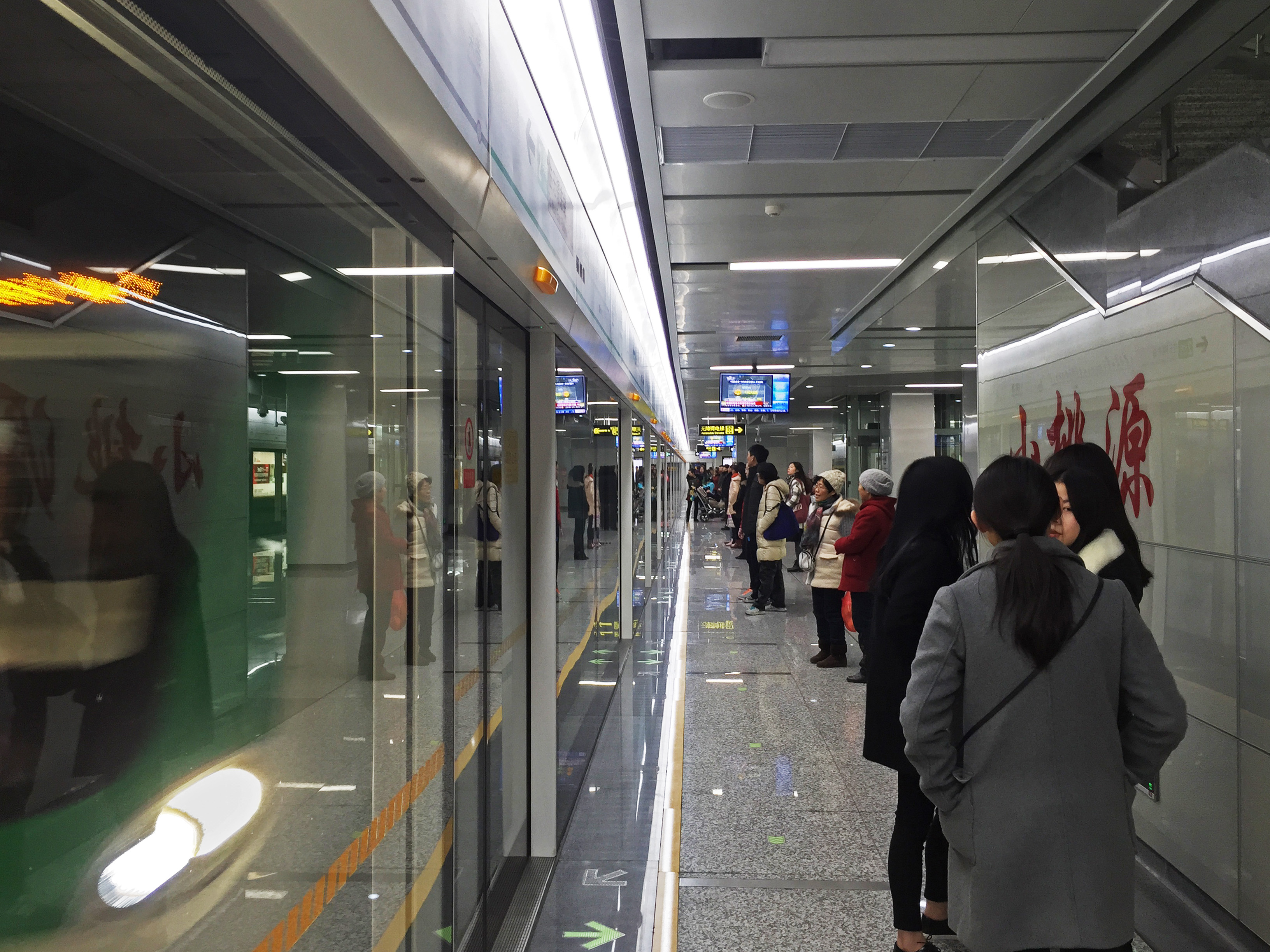 無錫地鐵2號線小桃源站站臺